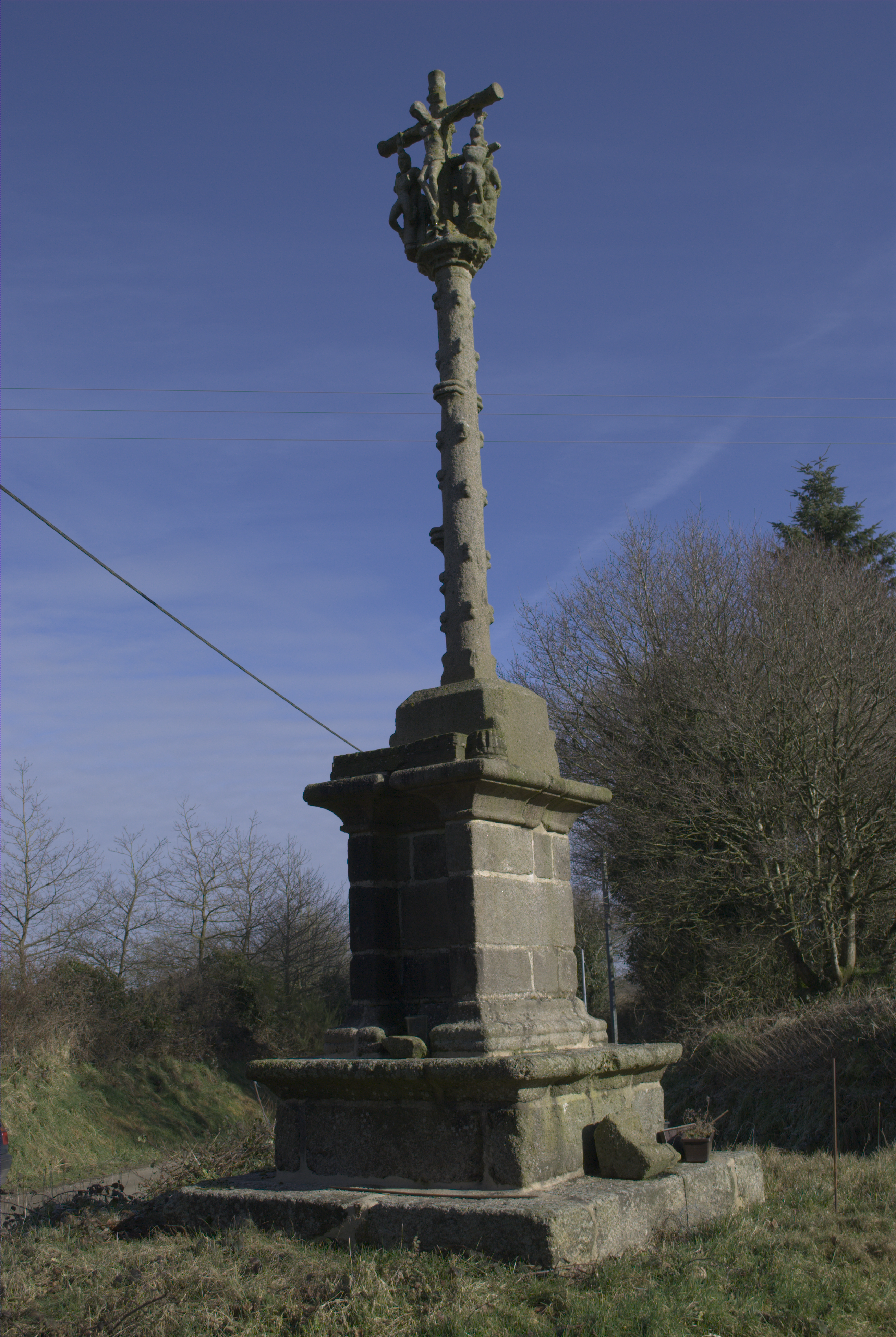 Calvaire de Kerligan sur la commune de Kerien (France).